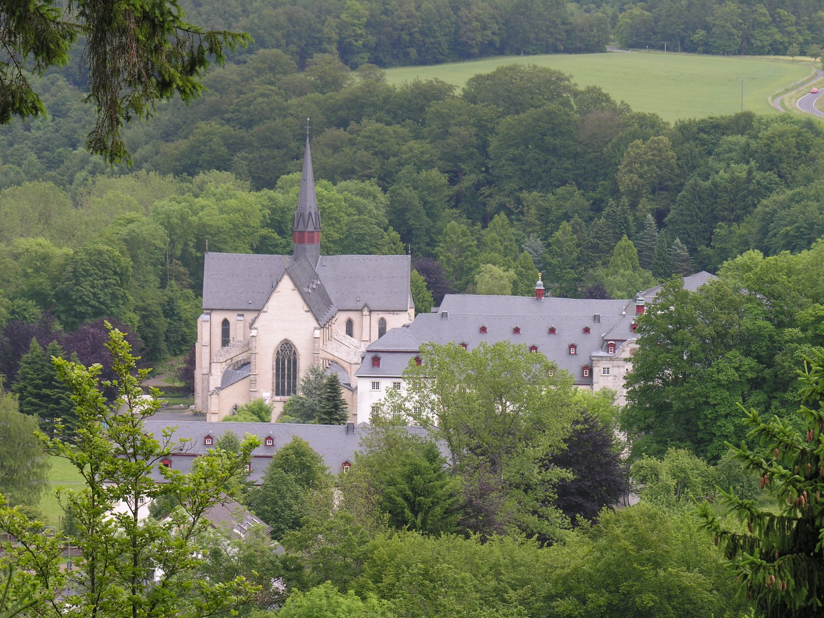 Abtei Marienstatt